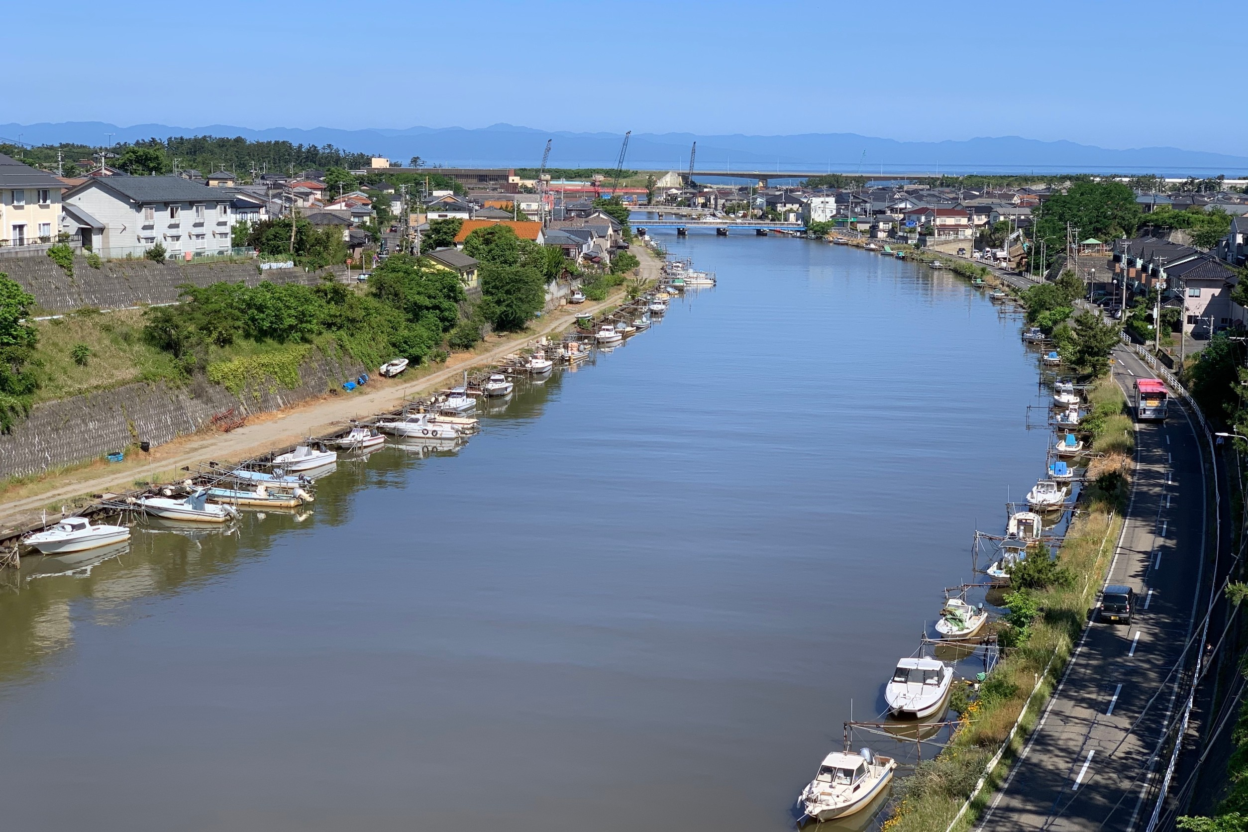 新川および新川漁港を新川元橋より望む（新潟市西区，2020年6月）